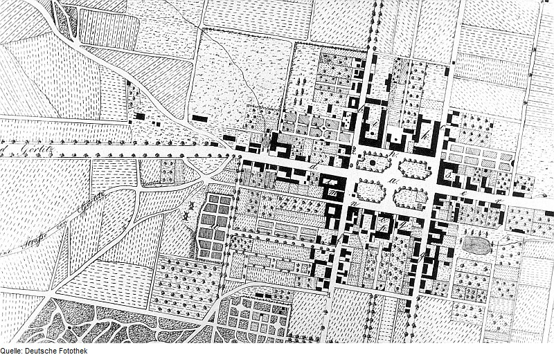 Original image description from the Deutsche Fotothek Niesky. Stadtgrundriß, Ausschnitt aus: Plan von Niesky, 1823 (Sign.: IX 33)